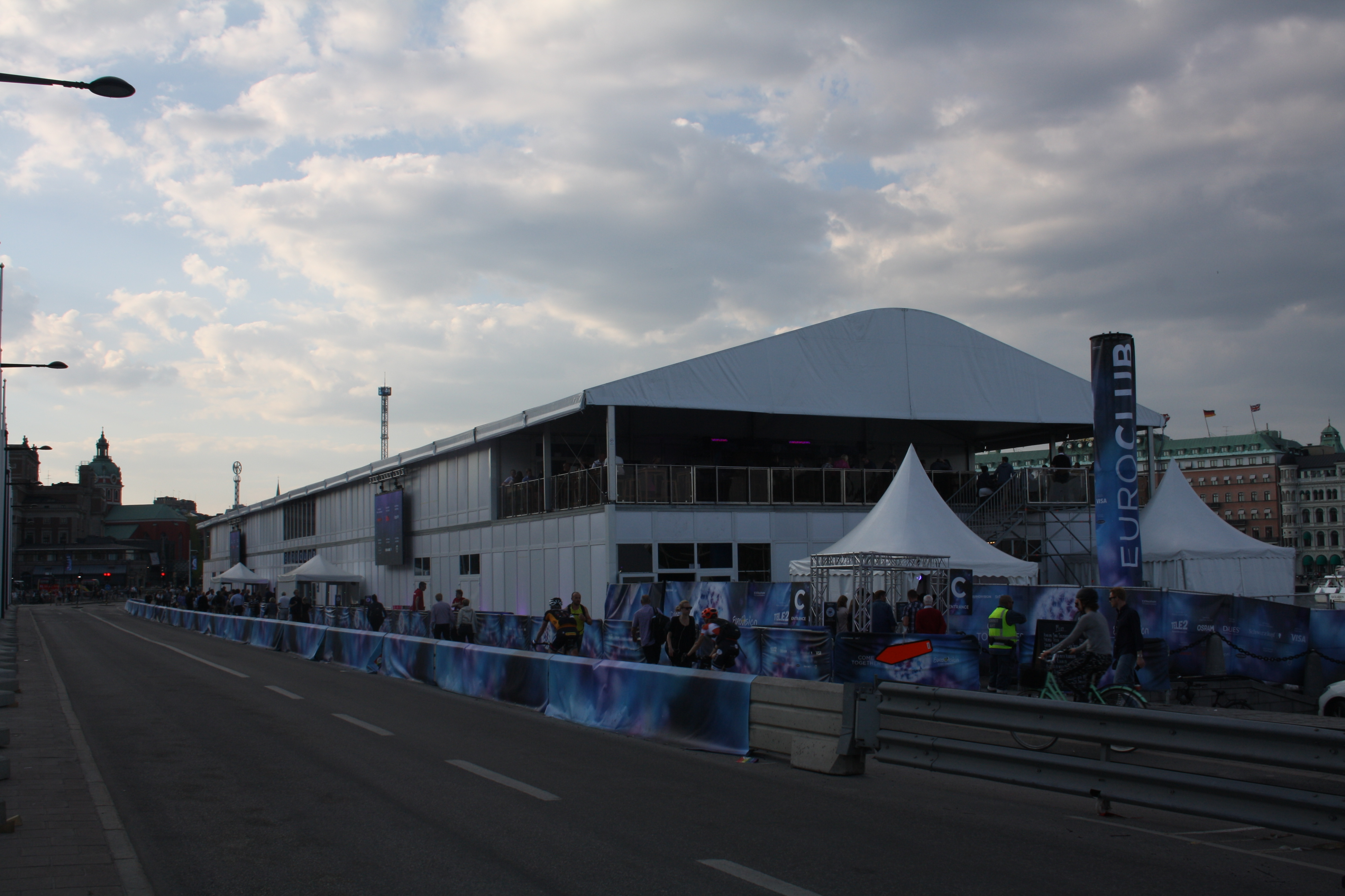 Eurovision Club 2016